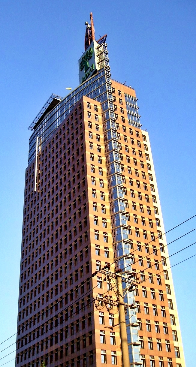 Birmann 21, projetado pelo escritório Skidmore, Owings & Merril.